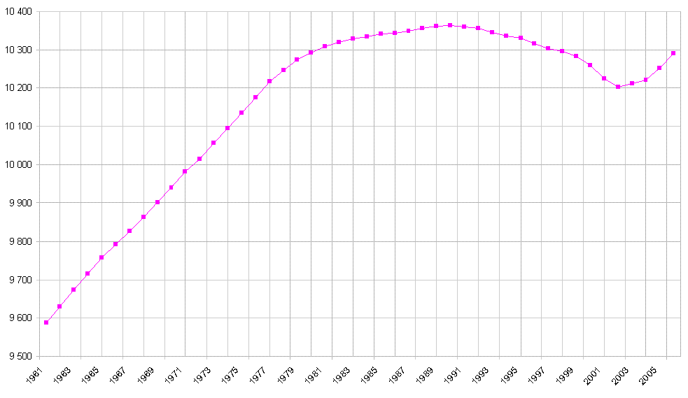 Czech population (1961-2006).